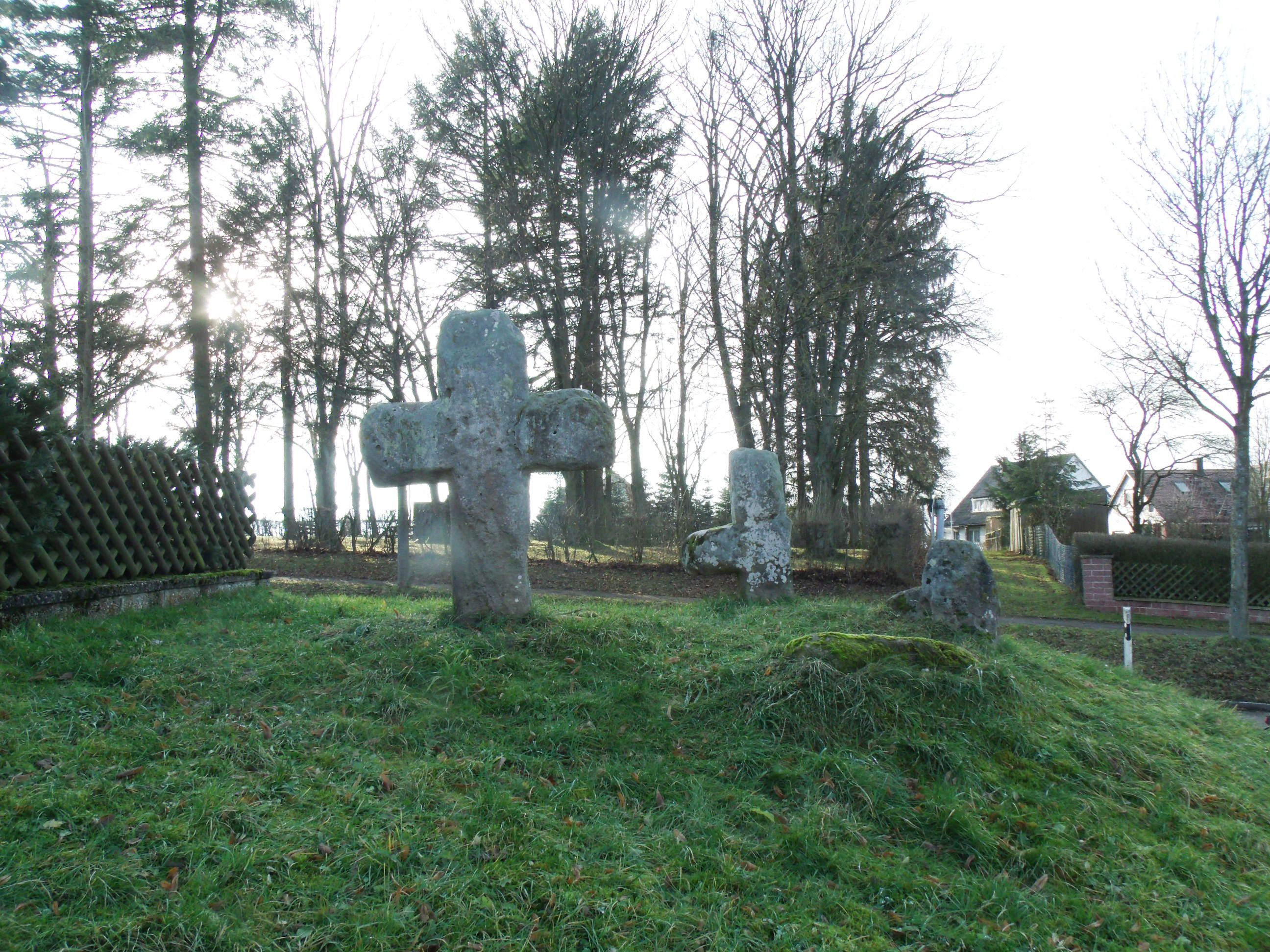 Neunkirchen, Ortsteil von Leutershausen im Landkreis Ansbach, Steinkreuze "Die 7 Fuhrmänner"